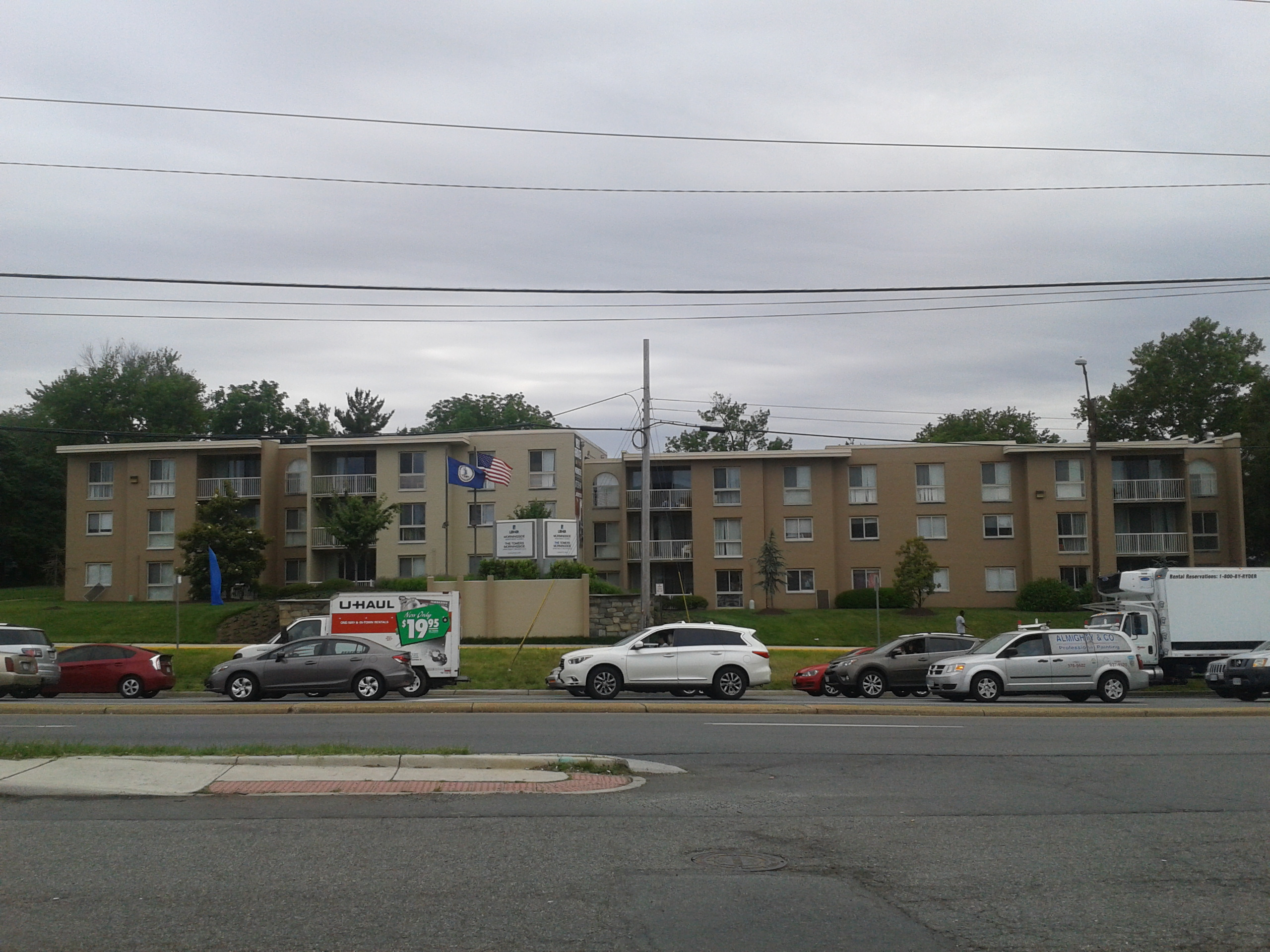 Apartment complex in Lincolnia, Virginia